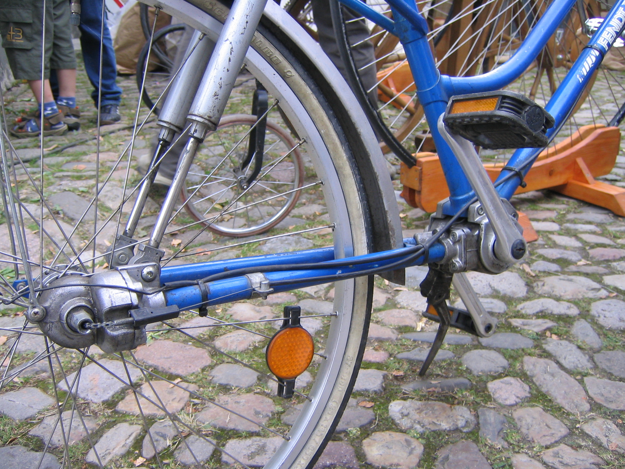 Fendt Cardano Comfort (Fahrrad ohne Kettenantrieb) während der Verantaltung Stages! in Staufen im Breisgau